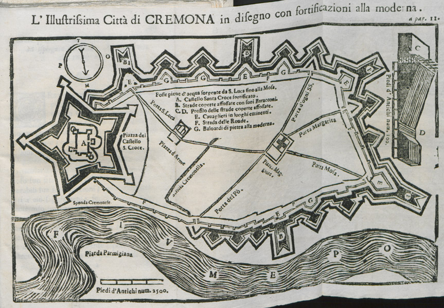 Cremona nel 17esimo secolo tratto da Vero riparo